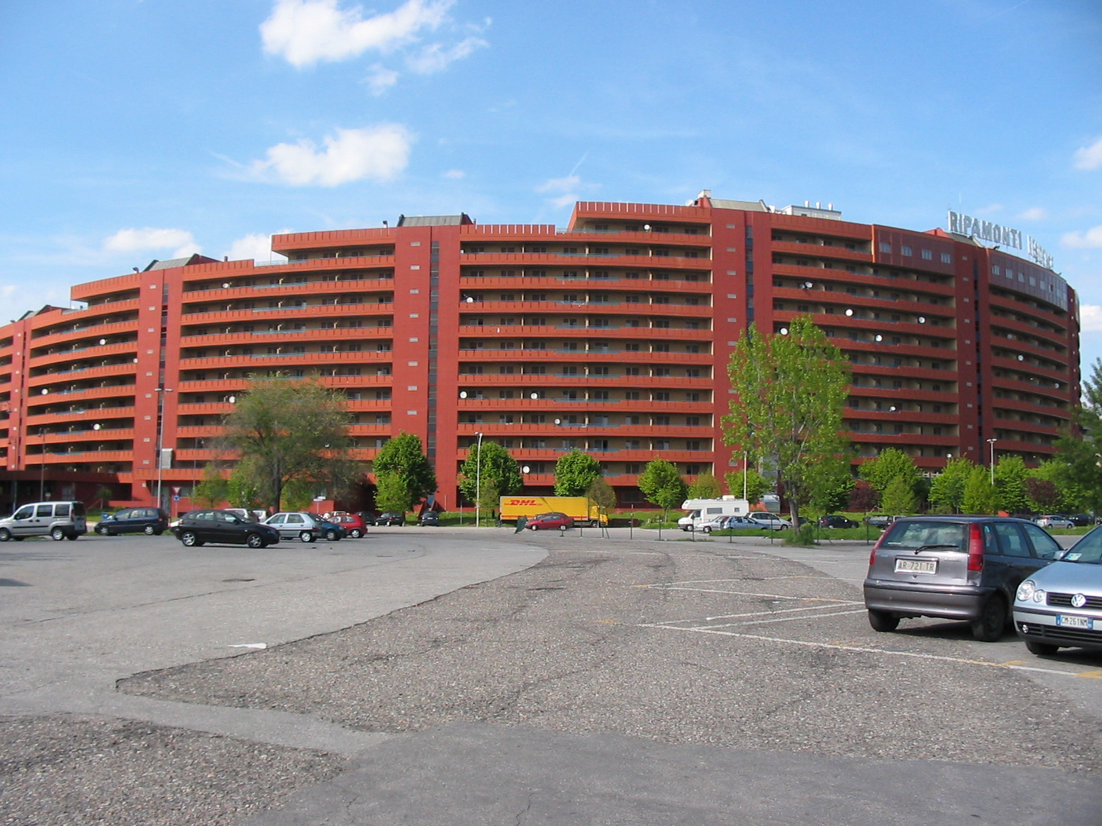 Hotel Ripamonti (Milano)